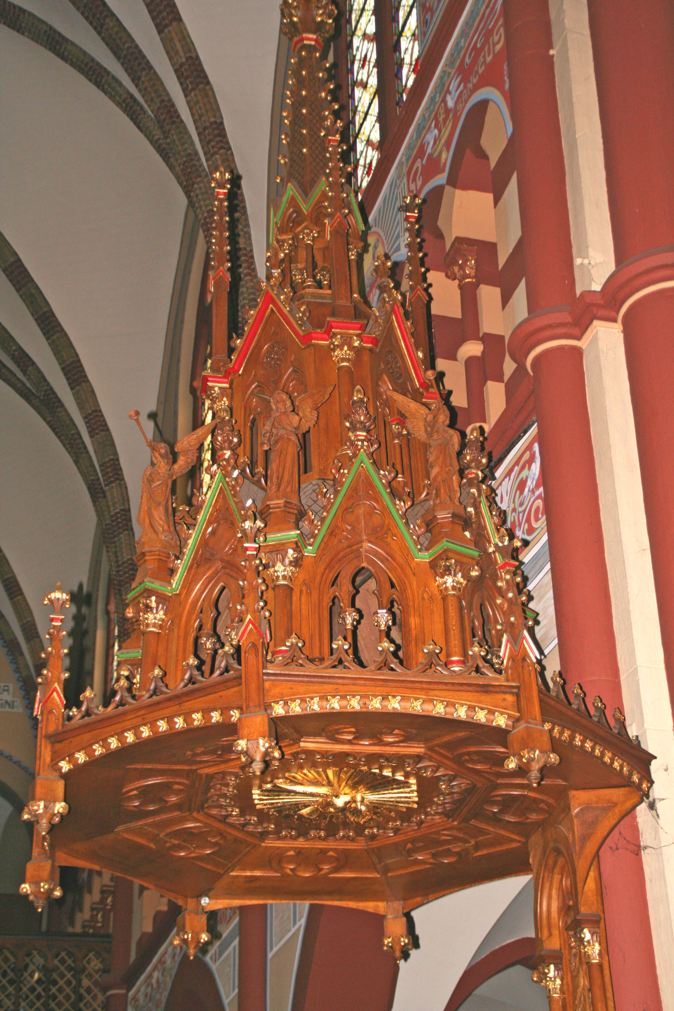 Rëmelenger Kierch Priedegtstullsdaach.